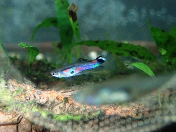 Živorodka Kempkesiho, samec